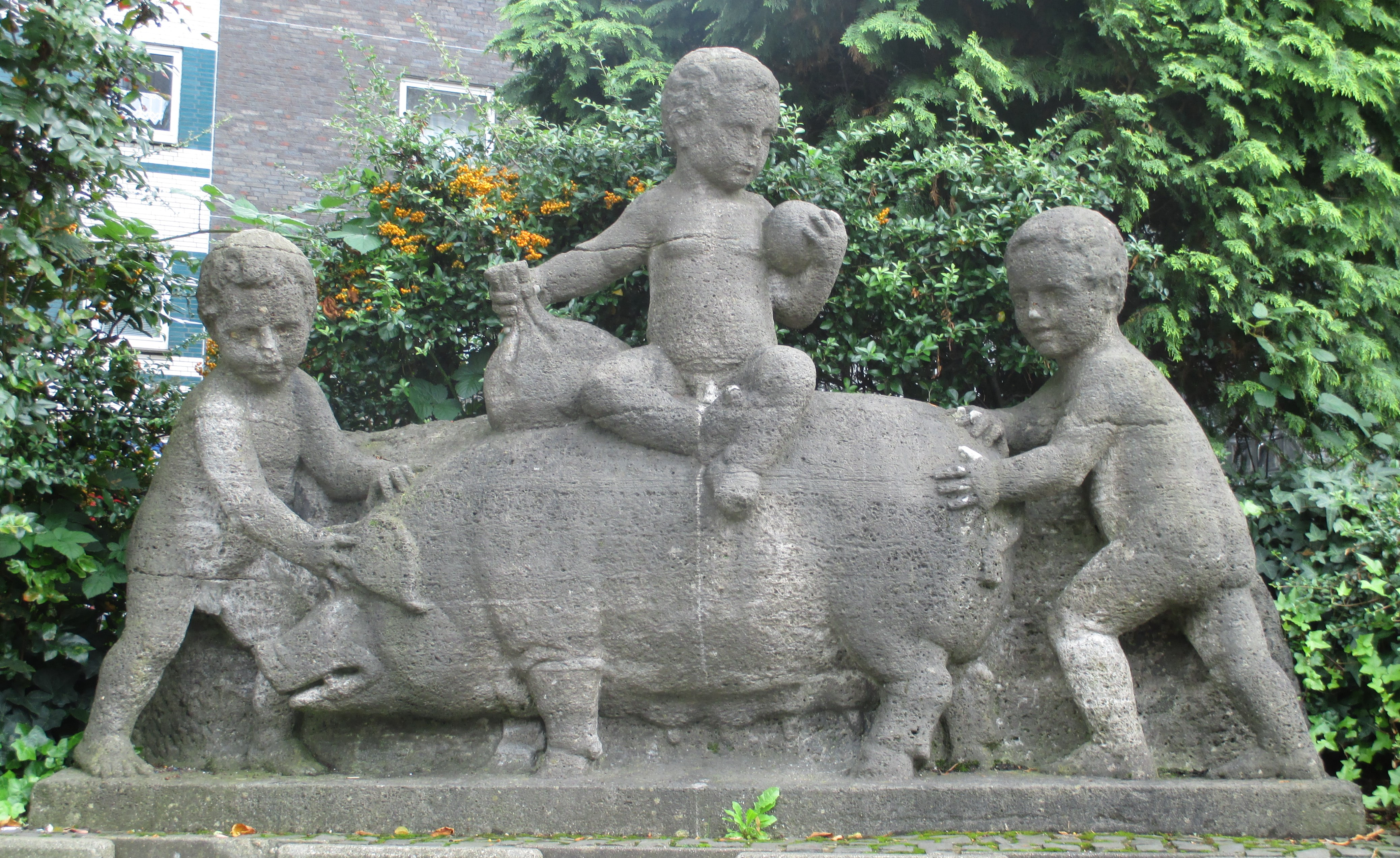 Die Skulptur der drei Knaben mit der Sau von Uffert Jansen war einst Portalschmuck der damaligen Hauptsparkasse am Viktoriaplatz (Heute Synagogenplatz). Das Hinterteil des Schweines war auf die Synagoge gerichtet. Nach Protesten entfernte man sie 1909 und brachte sie im damaligen Tiefbauamt unter. Seit 2001 steht sie an der Sparkasse Ecke Aktienstr. 80 / Engelbertusstr., 45473 Mülheim an der Ruhr, NRW, Deutschland This is a photograph of an architectural monument.It is on the list of cultural monuments of Mülheim an der Ruhr